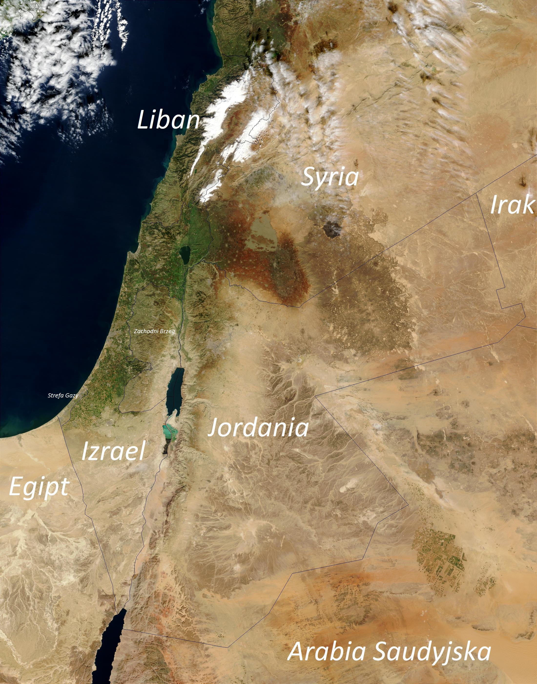 Bliski Wschód - mapa polityczna, zdjęcie z satelity